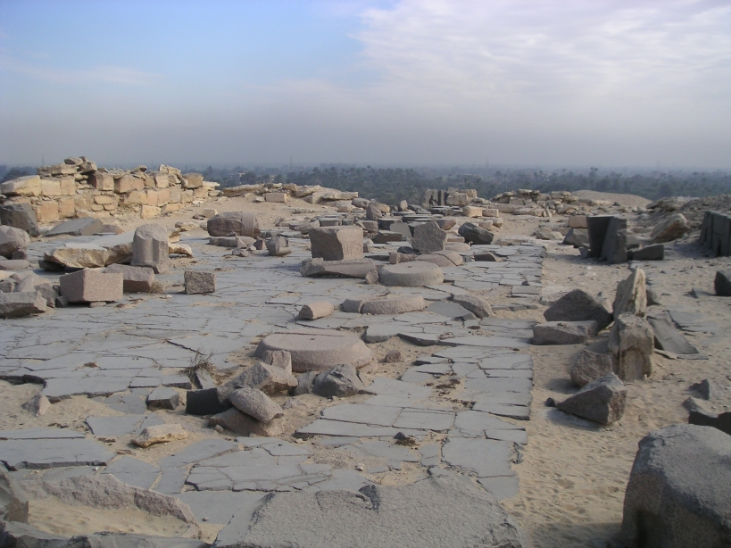 Vue des ruines de la grande cour à portique du temple funéraire de la pyramide de Niouserrê - Abousir - Ve dynastie égyptienne